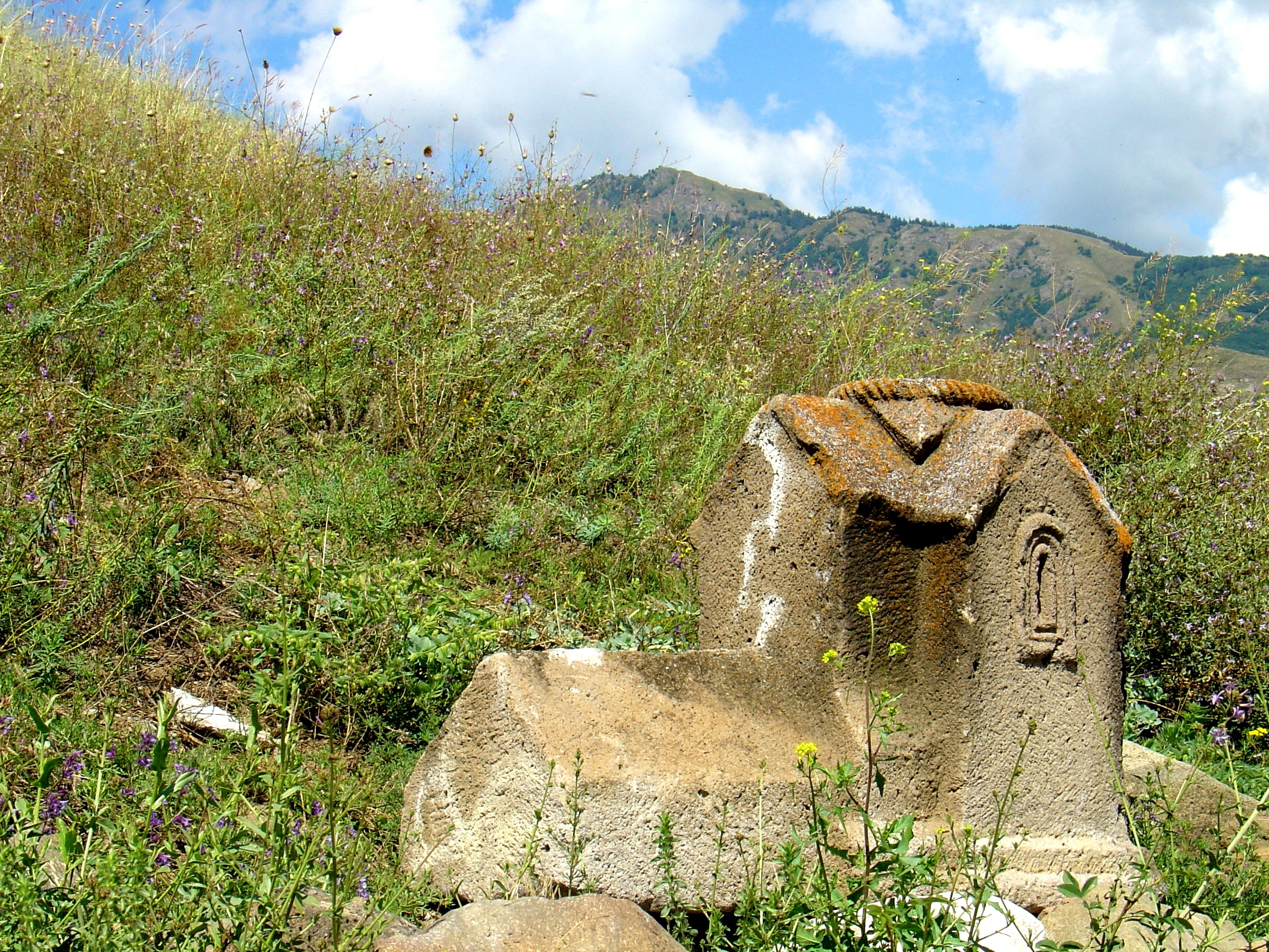 ოშორის ეკლესია. ეკლესიის მინიატურული გეგმა